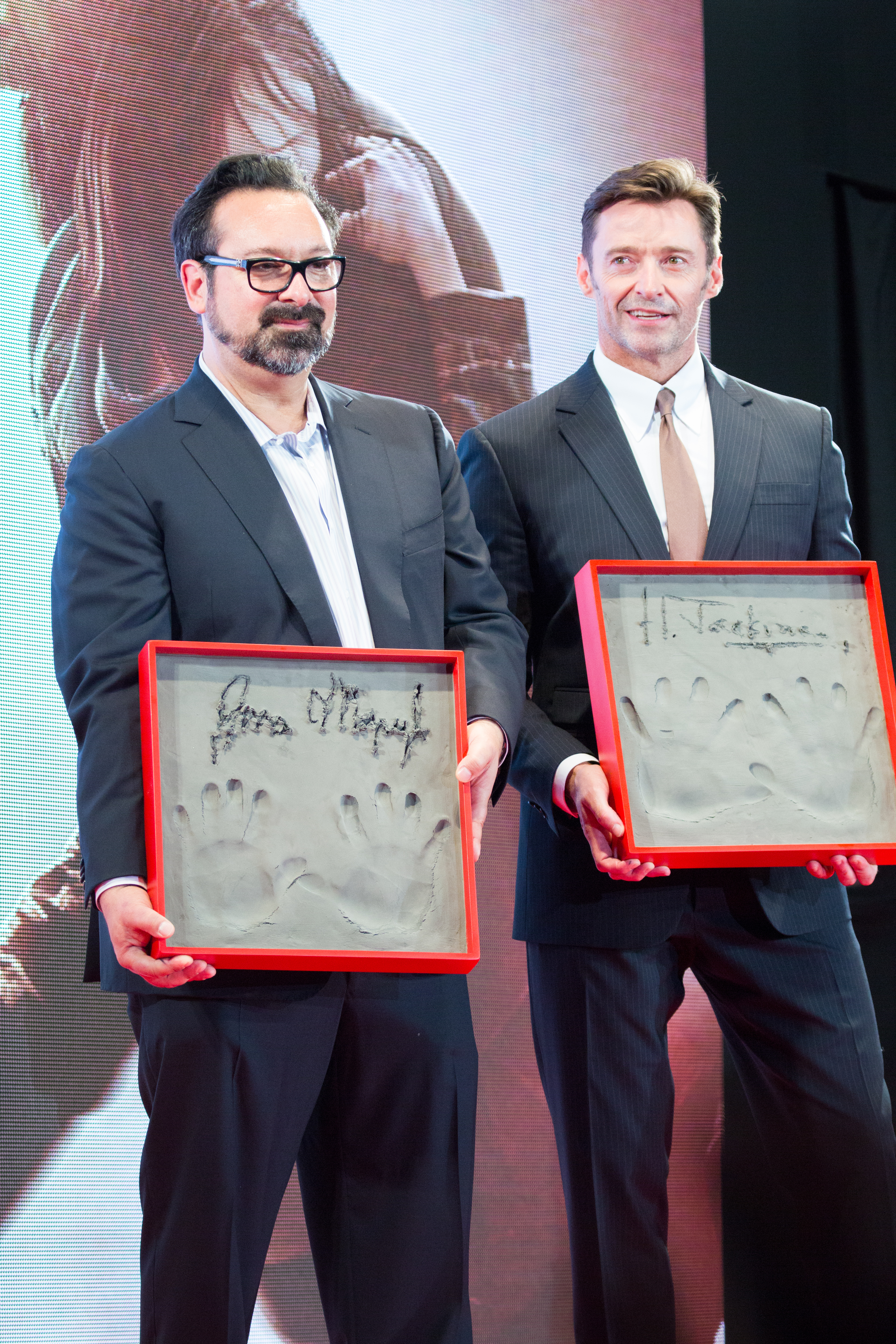 LOGAN/ローガン ジャパン・プレミア レッドカーペット ジェームズ・マンゴールド ヒュー・ジャックマン